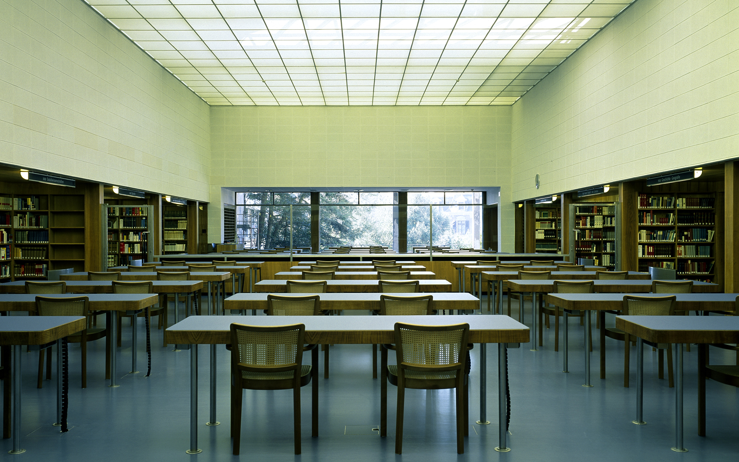 Schweizerische Nationalbibliothek - Ebene1 Lesesaal